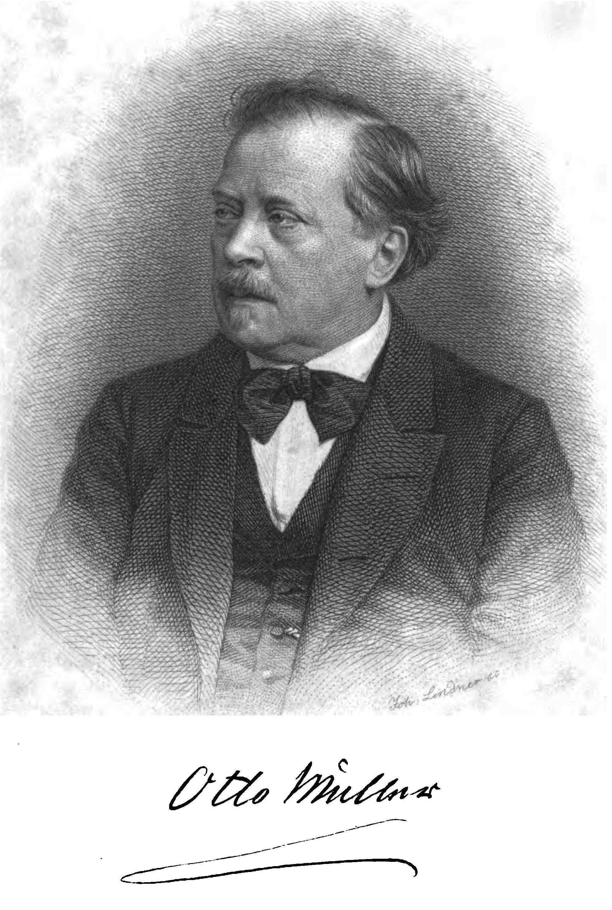 Porträt von Otto Müller, Stahlstich von Johann Lindner, 1873.